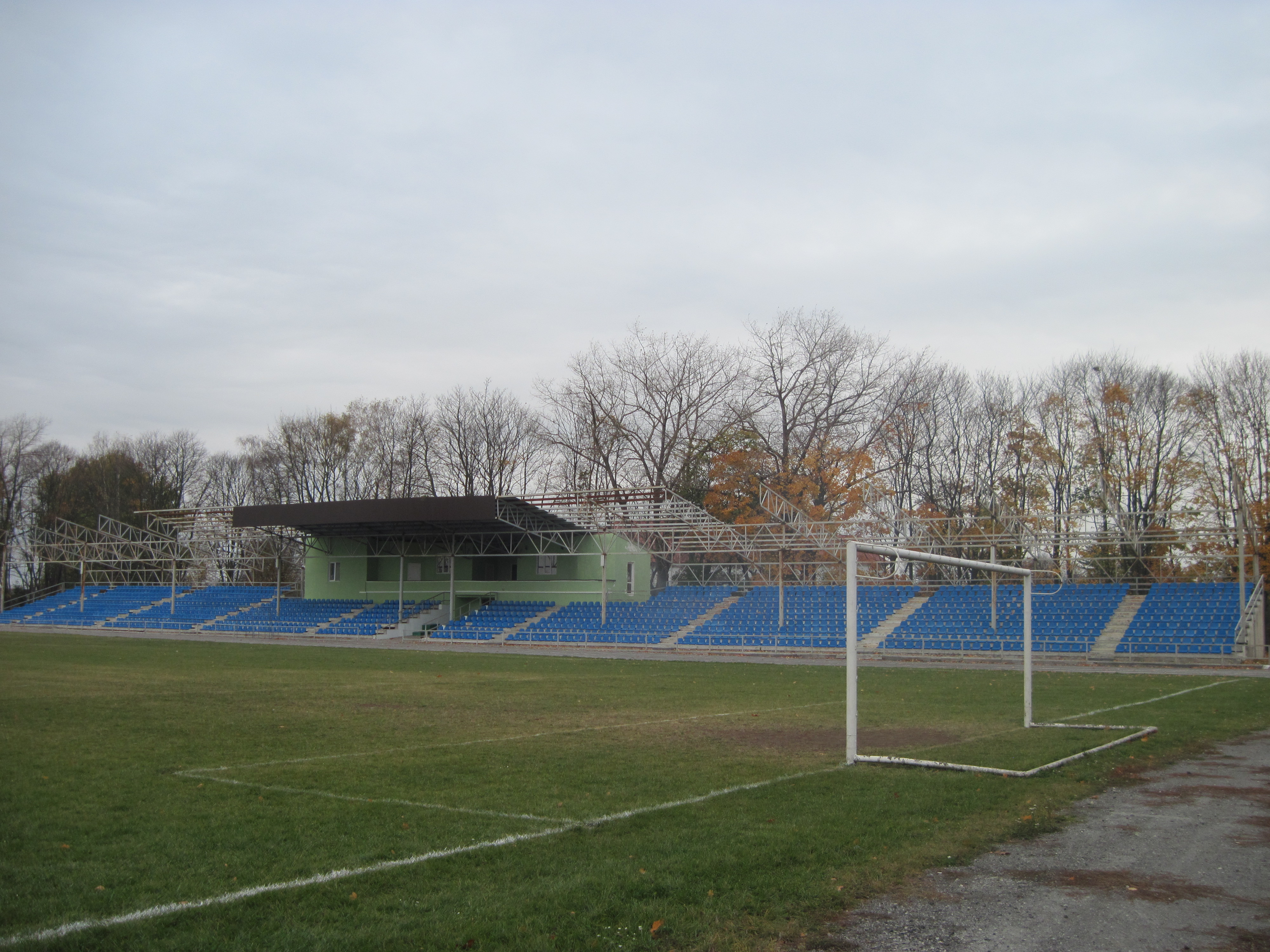 Стадіон, Збараж, осінь 2014